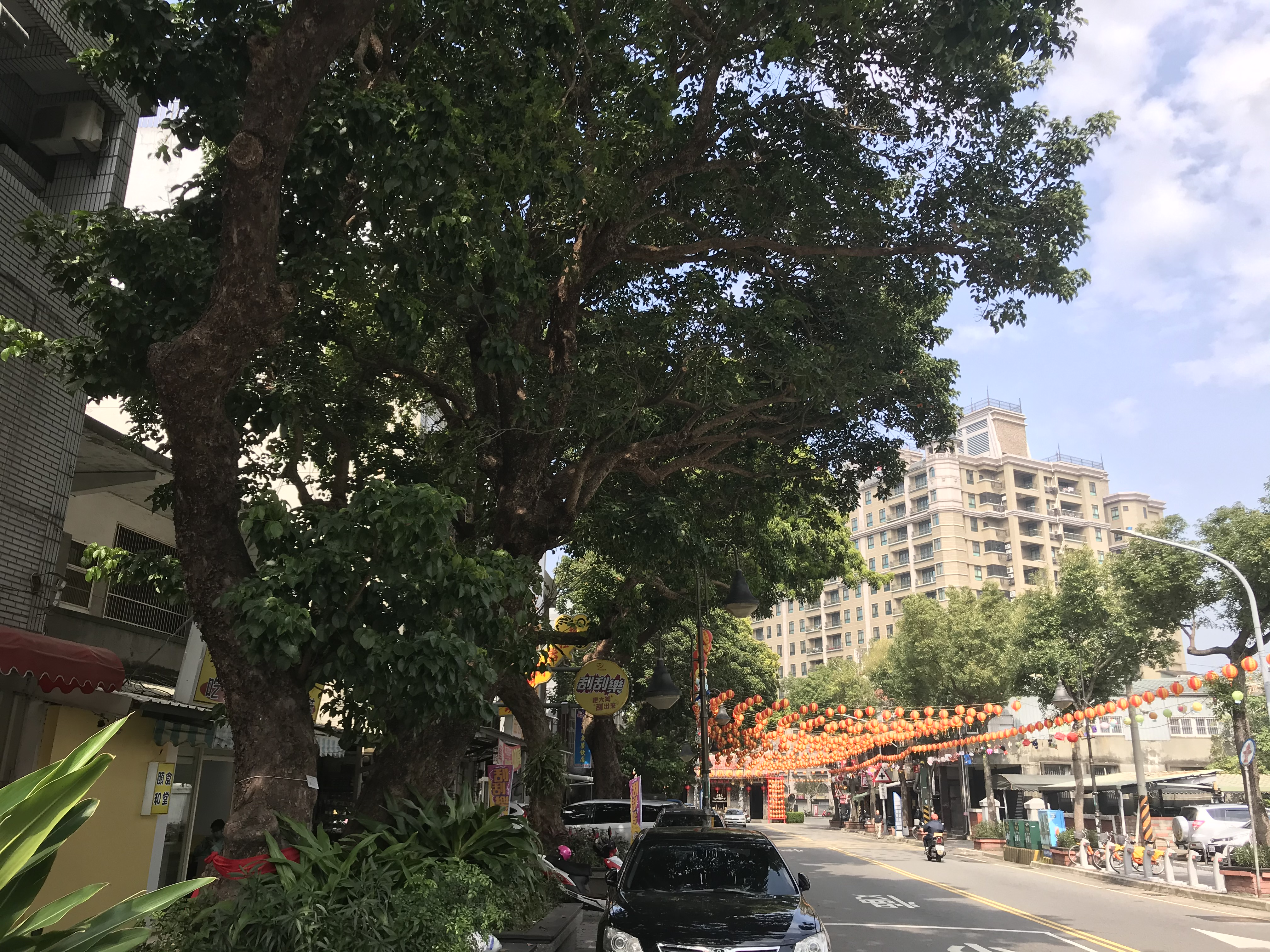 中文（台灣）: 八德三元宮老樹